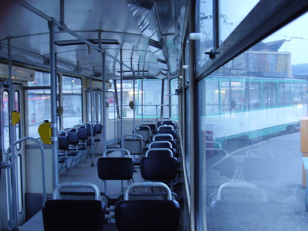 Interiér električky T6A5 (v Košiciach).